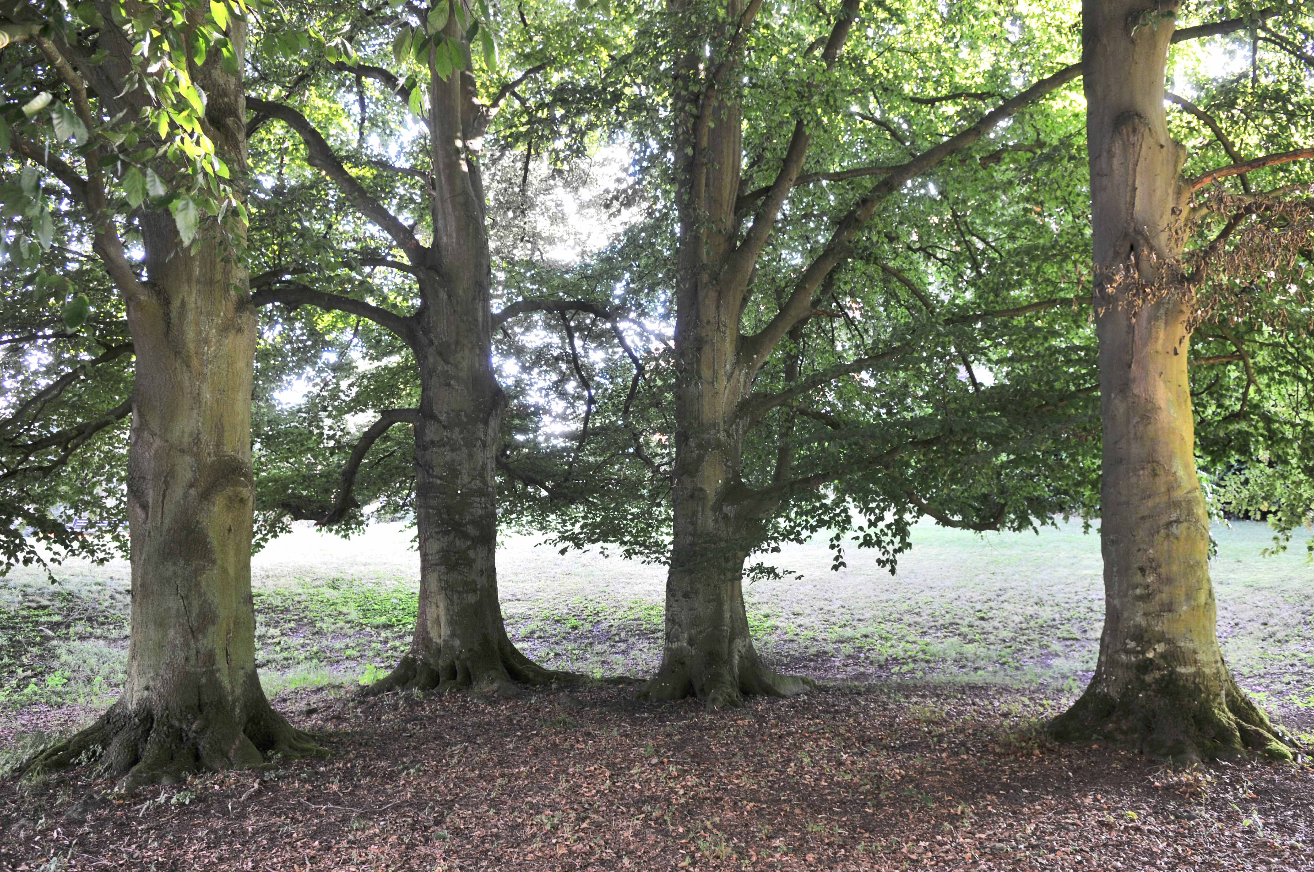 Bemierkenswäert Bluttbuchen zu Bouferdeng.